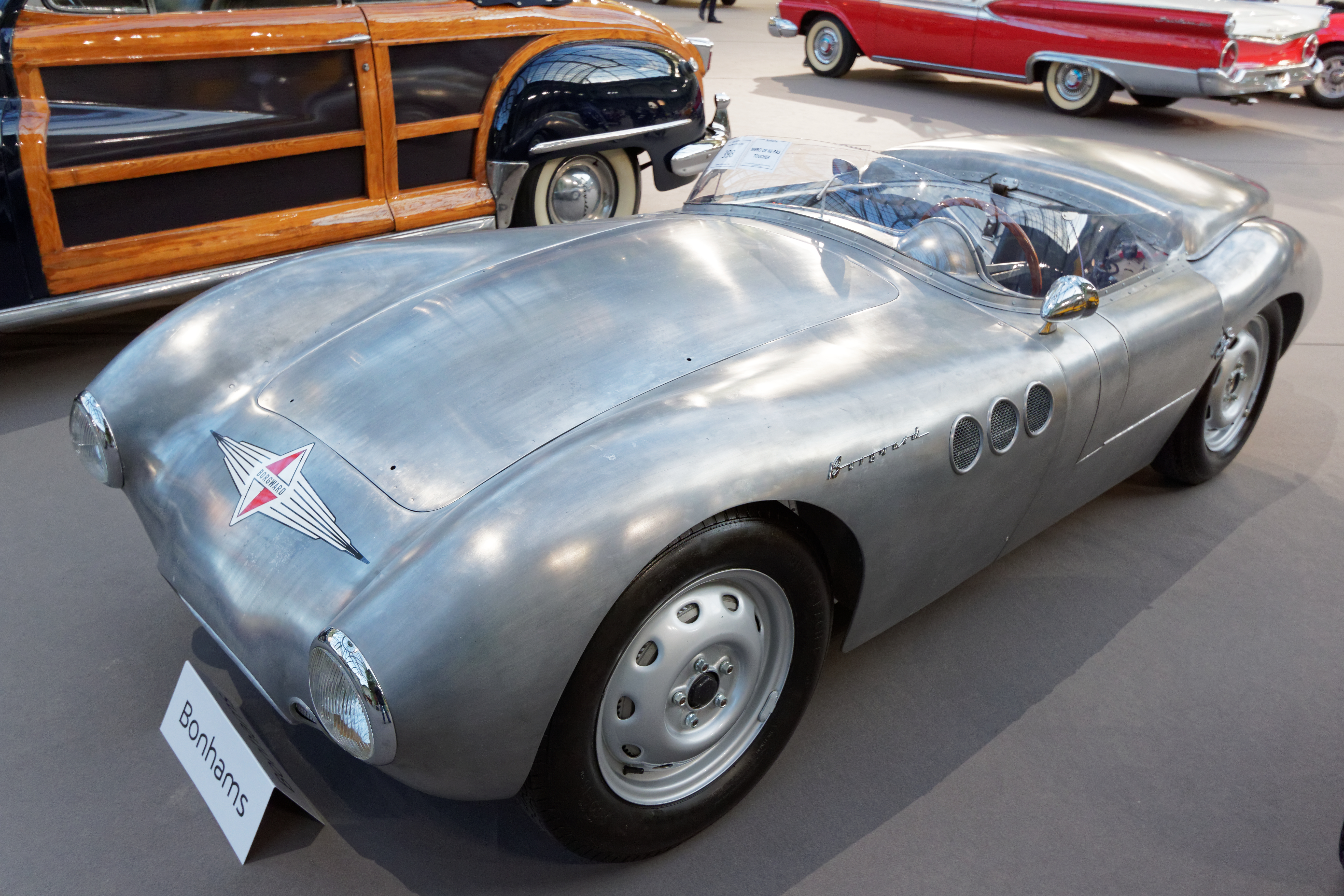 Un des véhicules présenté lors de la vente aux enchères Bonhams 2015 au Grand Palais de Paris.